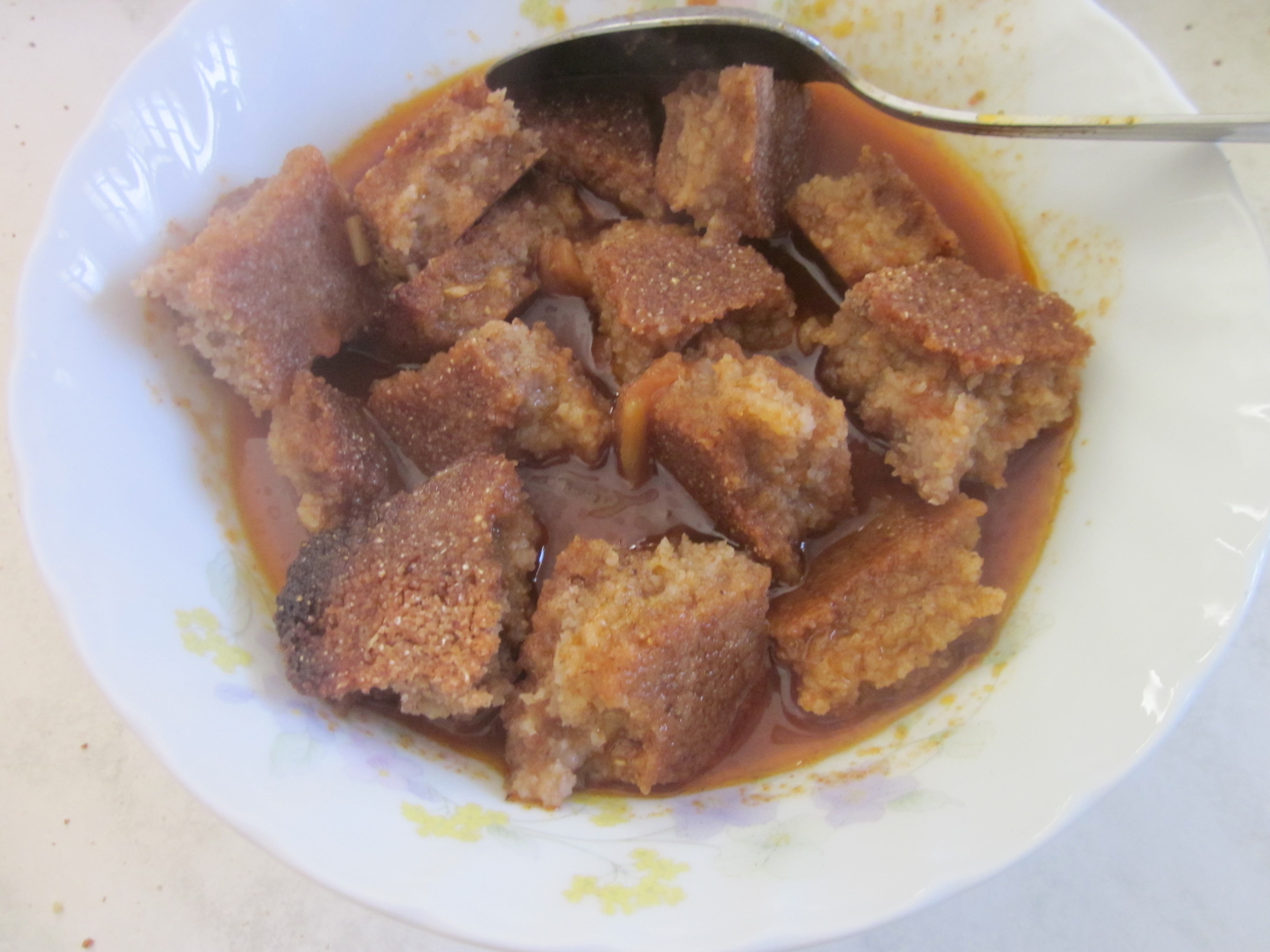 الطبق النهائي للمرقة.